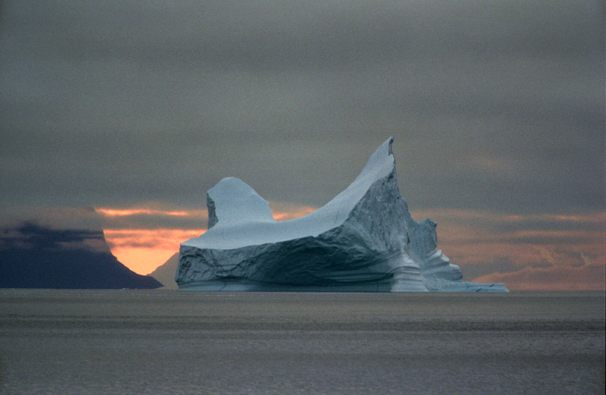 Franz Josef Fjord, Iceberg